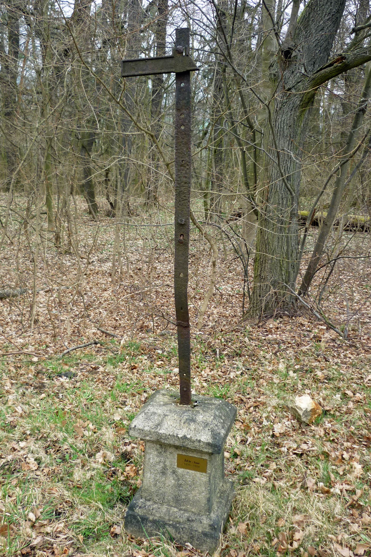 Lapidarium der zerstörten Orte im Duppauer Gebirge auf dem Winteritzer Kapellenberg: Reste eines Wegkreuzes aus Žďár – Saar (1295-1954)